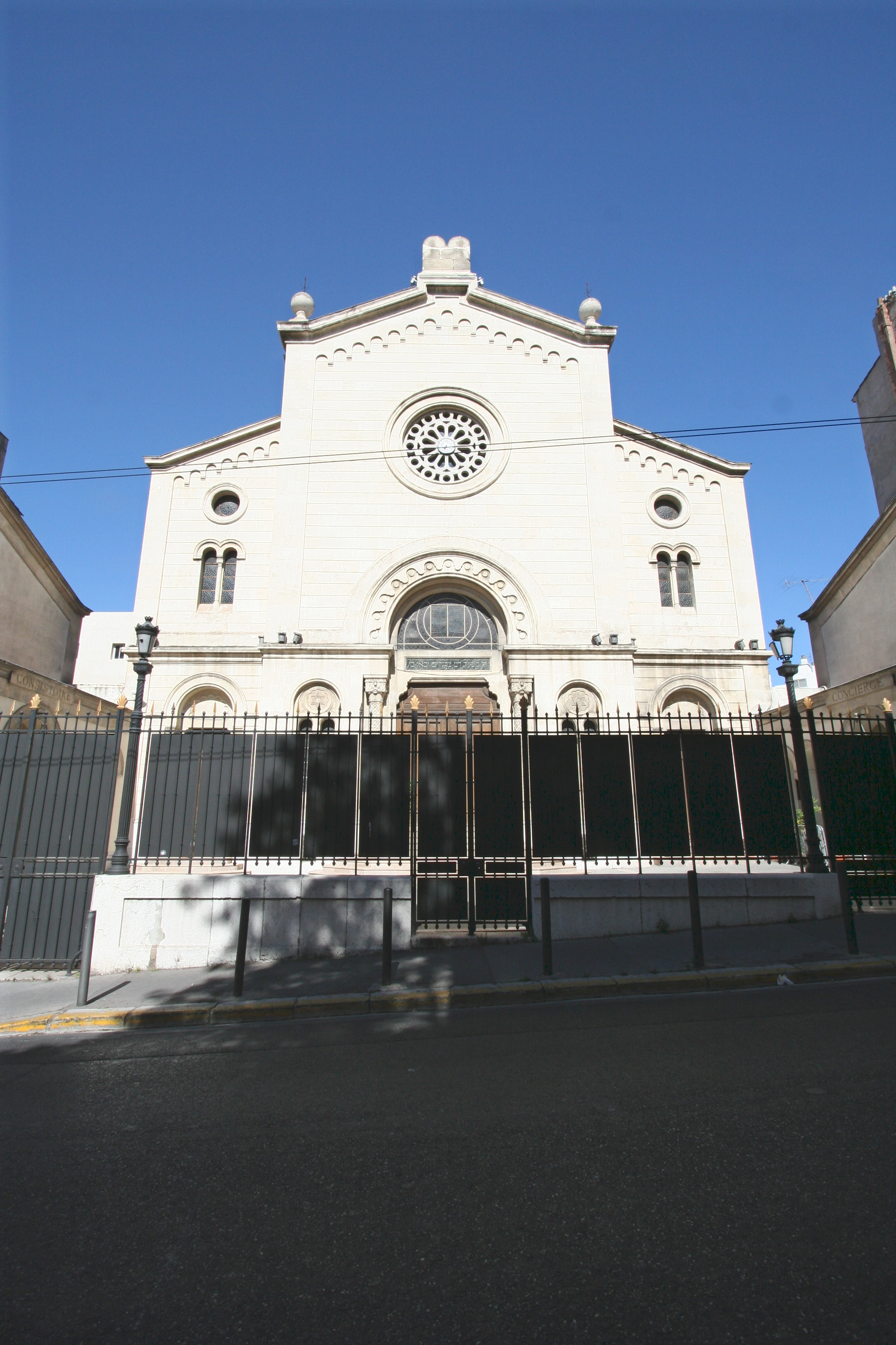 Grande synagogue de Marseille, Bouches-du-Rhône, France, située au N° 117 de la rue Breteuil et inscrite Monument Historique.